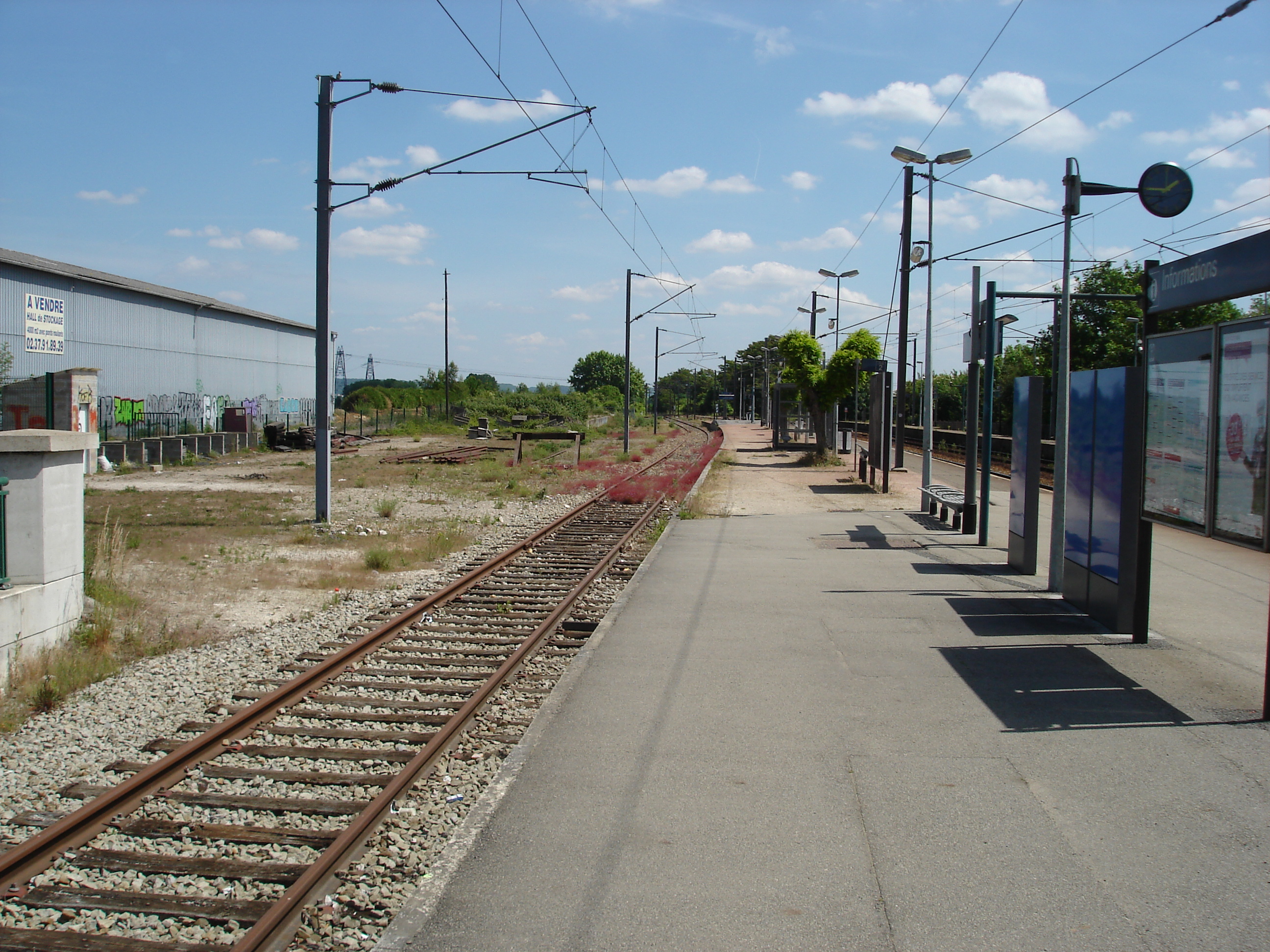 Gare de Montfort-l'Amaury - Méré (78) : Vue en direction de Paris, de la voie de service.